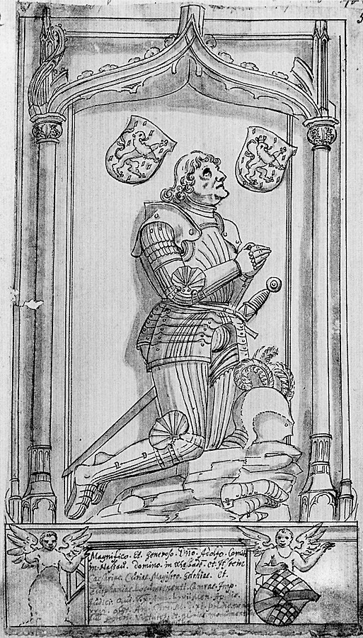 Tekening van het grafmonument voor Adolf III van Nassau-Wiesbaden